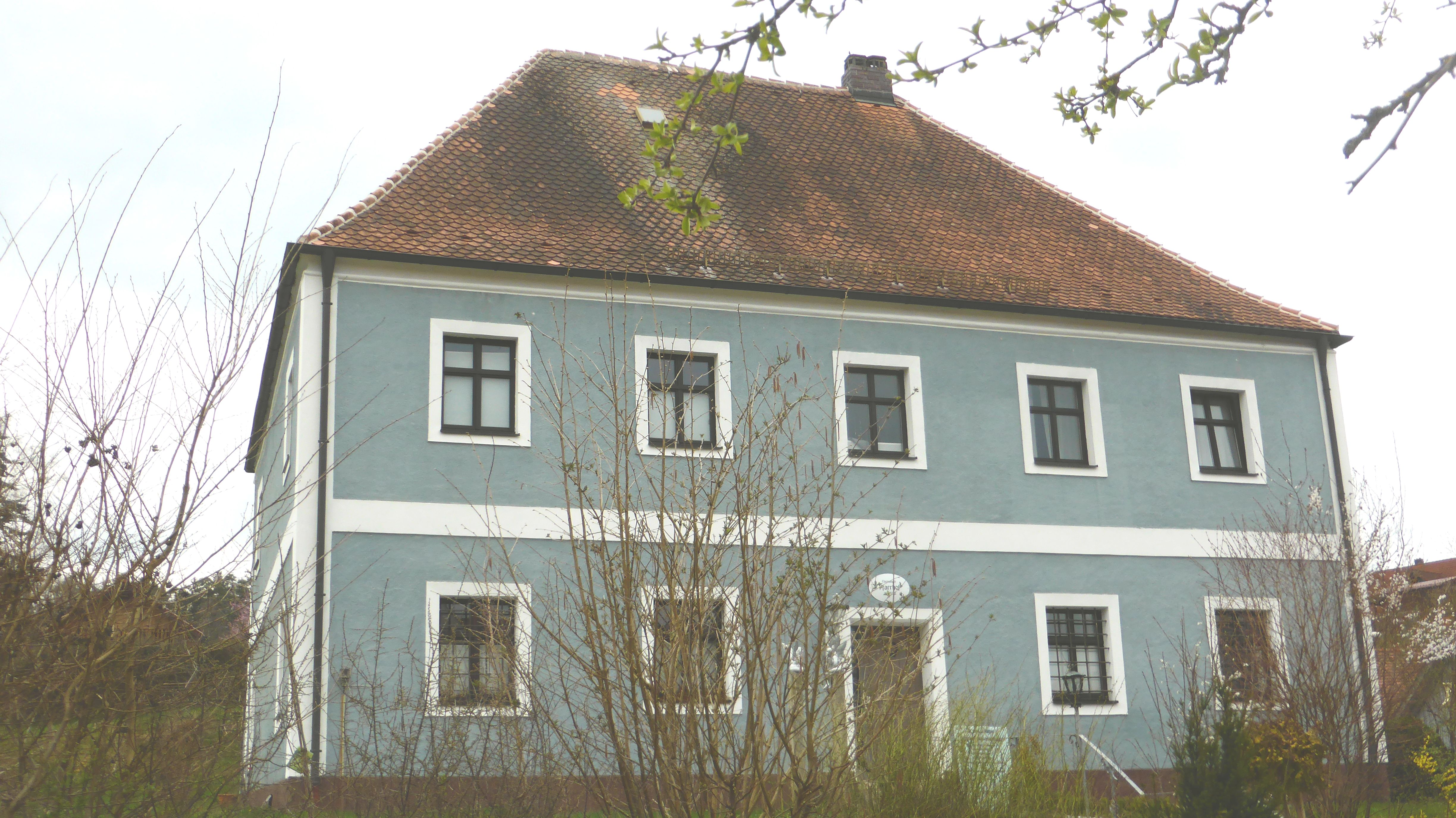 Theuern-Pfarrhof